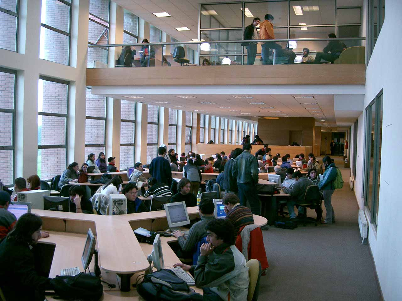 Bibloteca Inacap Temuco